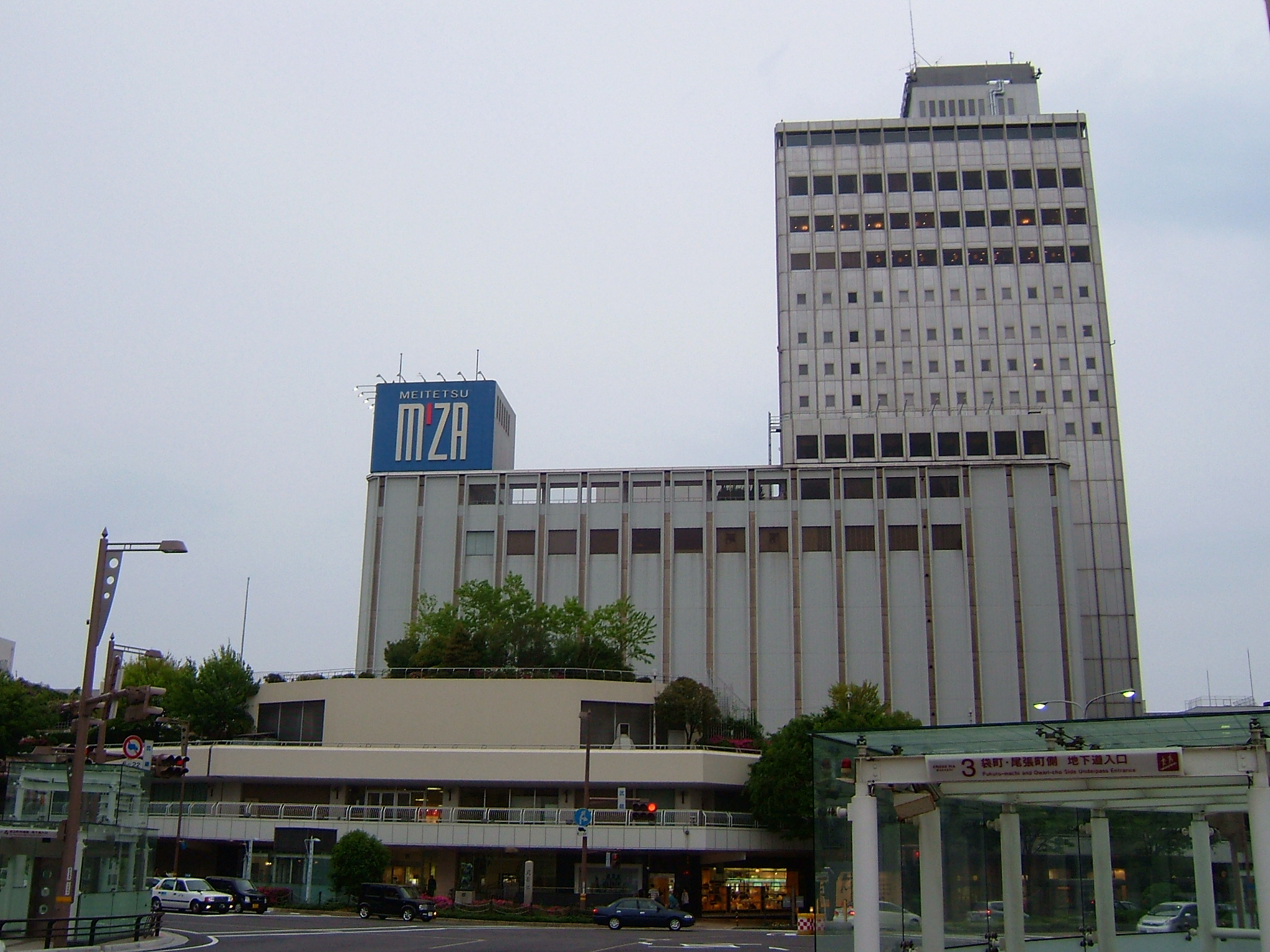 石川県金沢市のめいてつ・エムザおよび金沢スカイホテル。